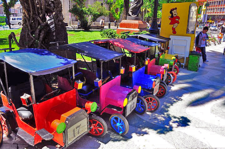 autos pequeños para niños en plaza de valparaiso